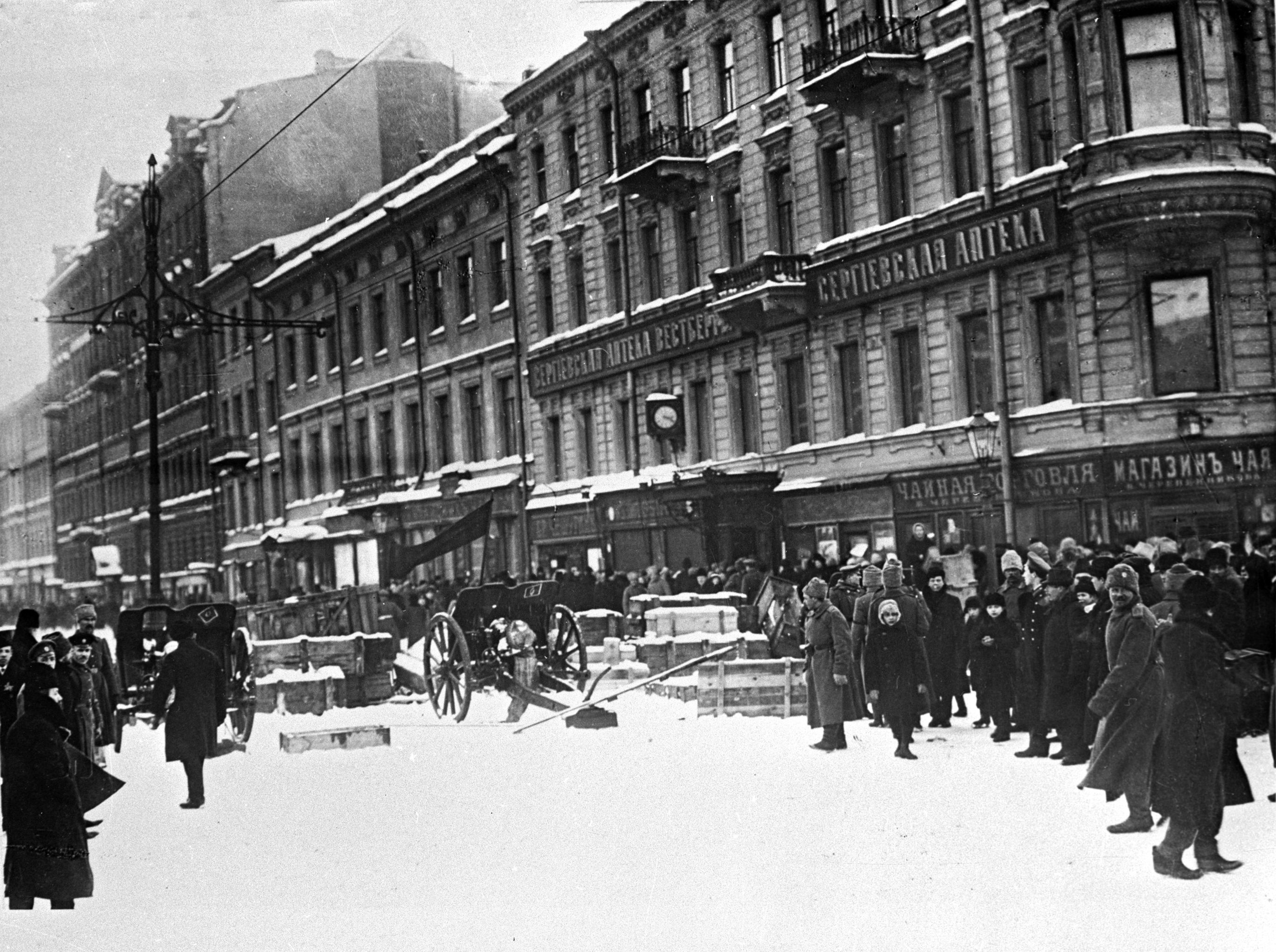 Cañones en Liteiny Prospekt cubriendo la avenida y el puente del mismo nombre, marzo de 1917.